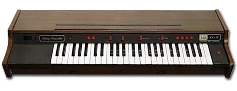 sintetizzatore ARP String Ensemble (Solina) Licensing Categoria:Sintetizzatori Categoria:Sintetizzatori ARP